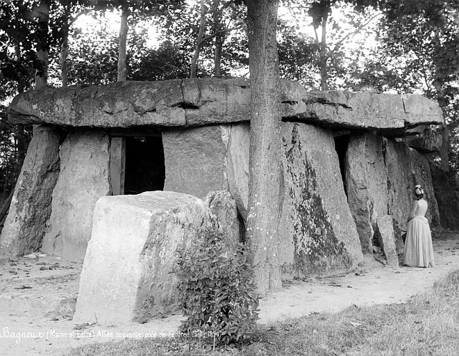 Vue d'ensemble du côté de l'entrée de l’allée couverte de Bagneux à Saumur. Photographie de Séraphin-Médéric Mieusement.